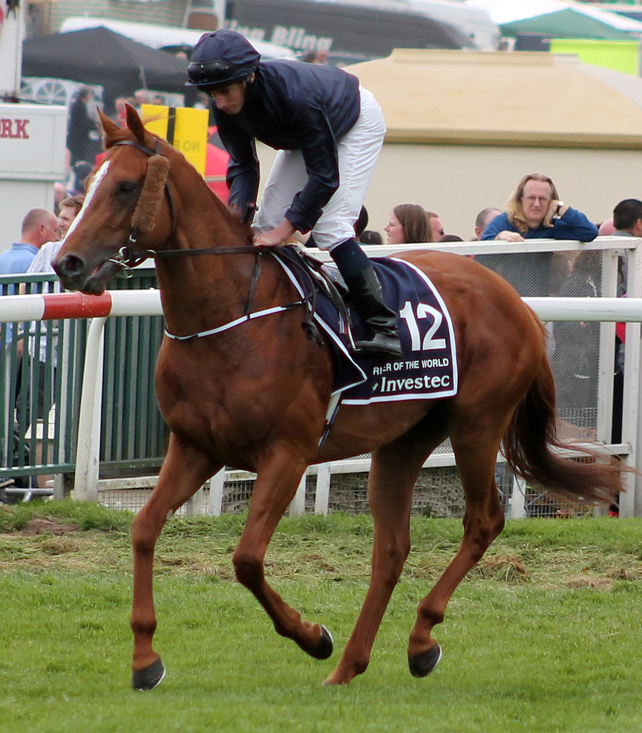 2013 Epsom Derby